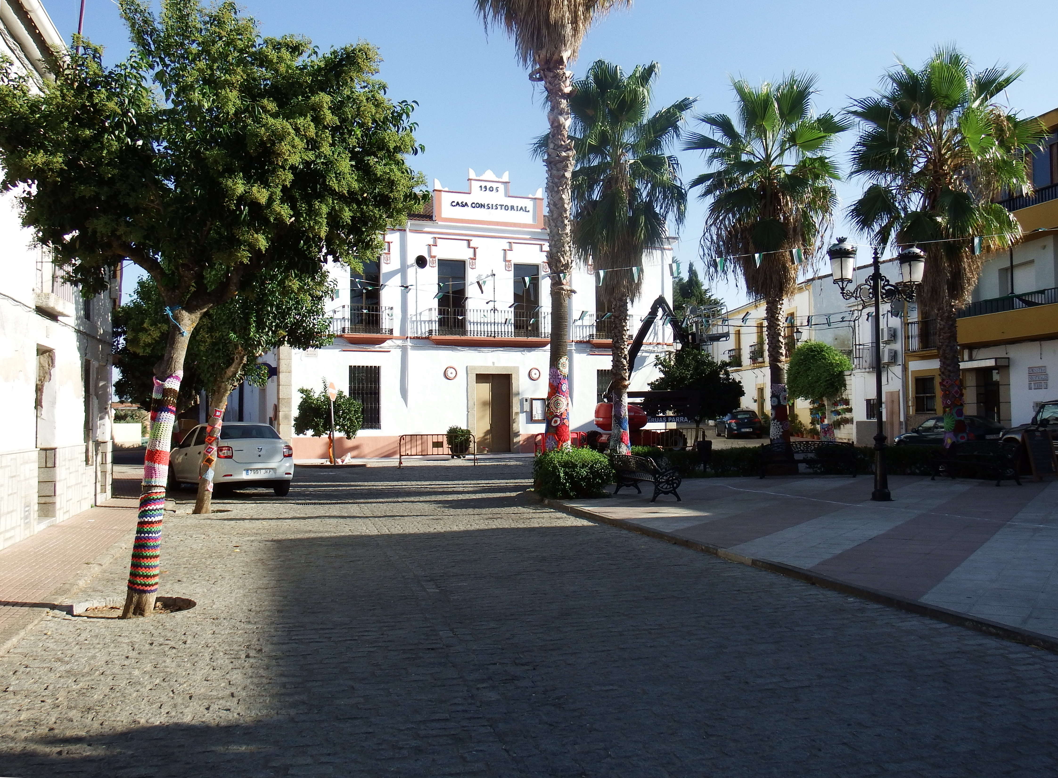 Aldea del Cano